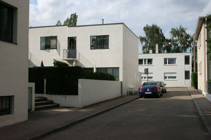 Weissenhofsiedlung Stuttgart, Haus von J. J. P. Oud (in der Bildmitte links)